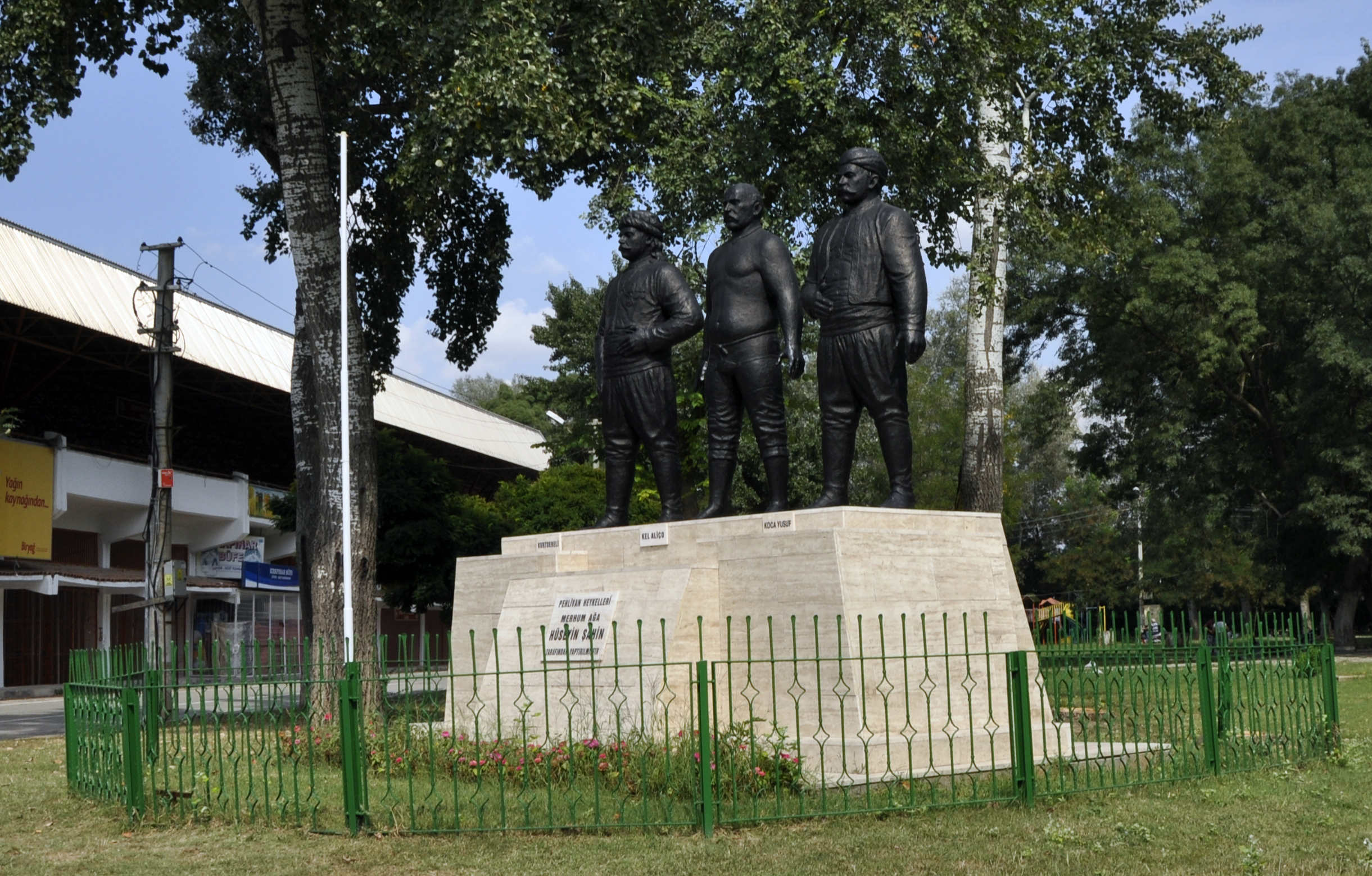 Kırkpınar